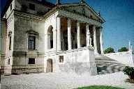 La Rotonde, près de Vicence.jpg (GFDL) Melusin M:) Melusin propriétaire des négatifs.